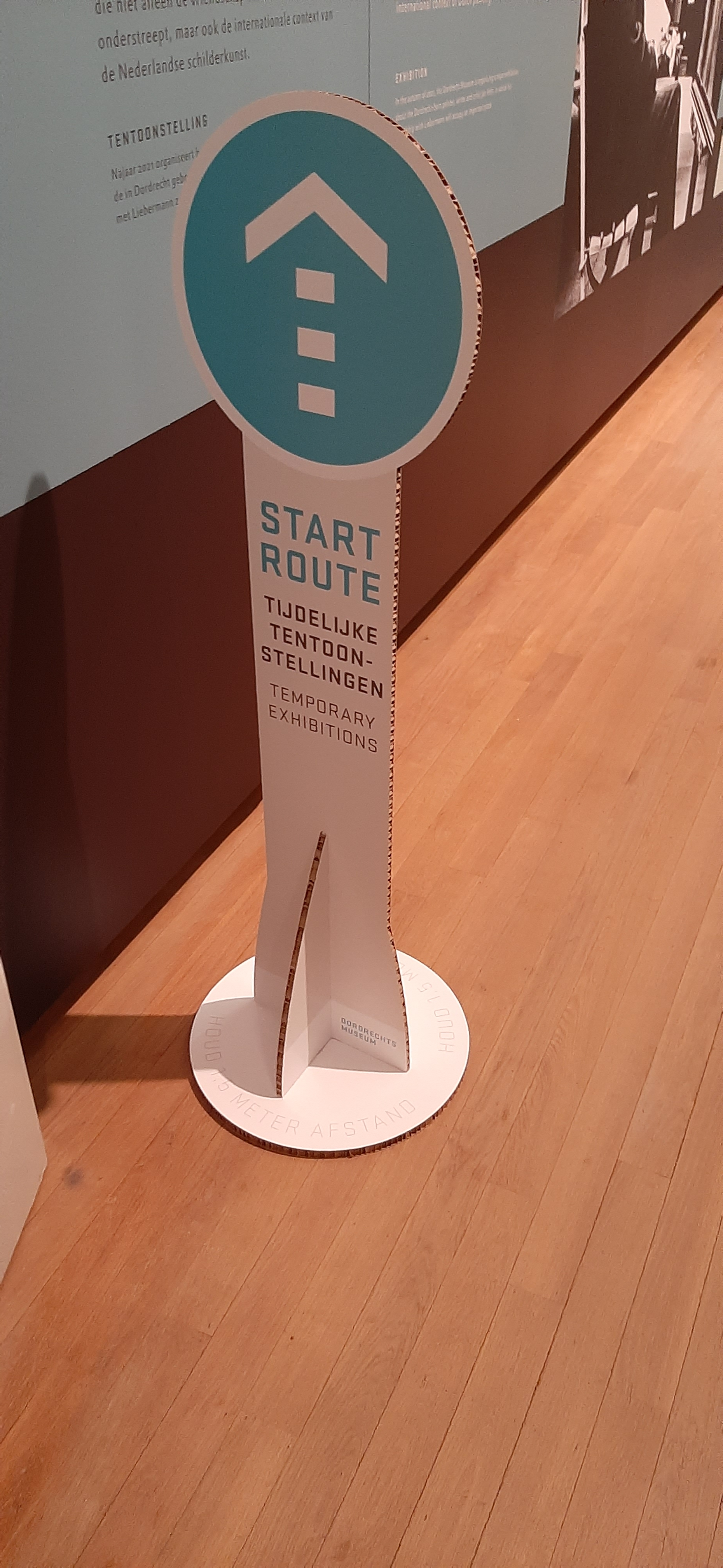 Verplichte looproute in het Dordrechts Museum gedurende de coronacrisis.